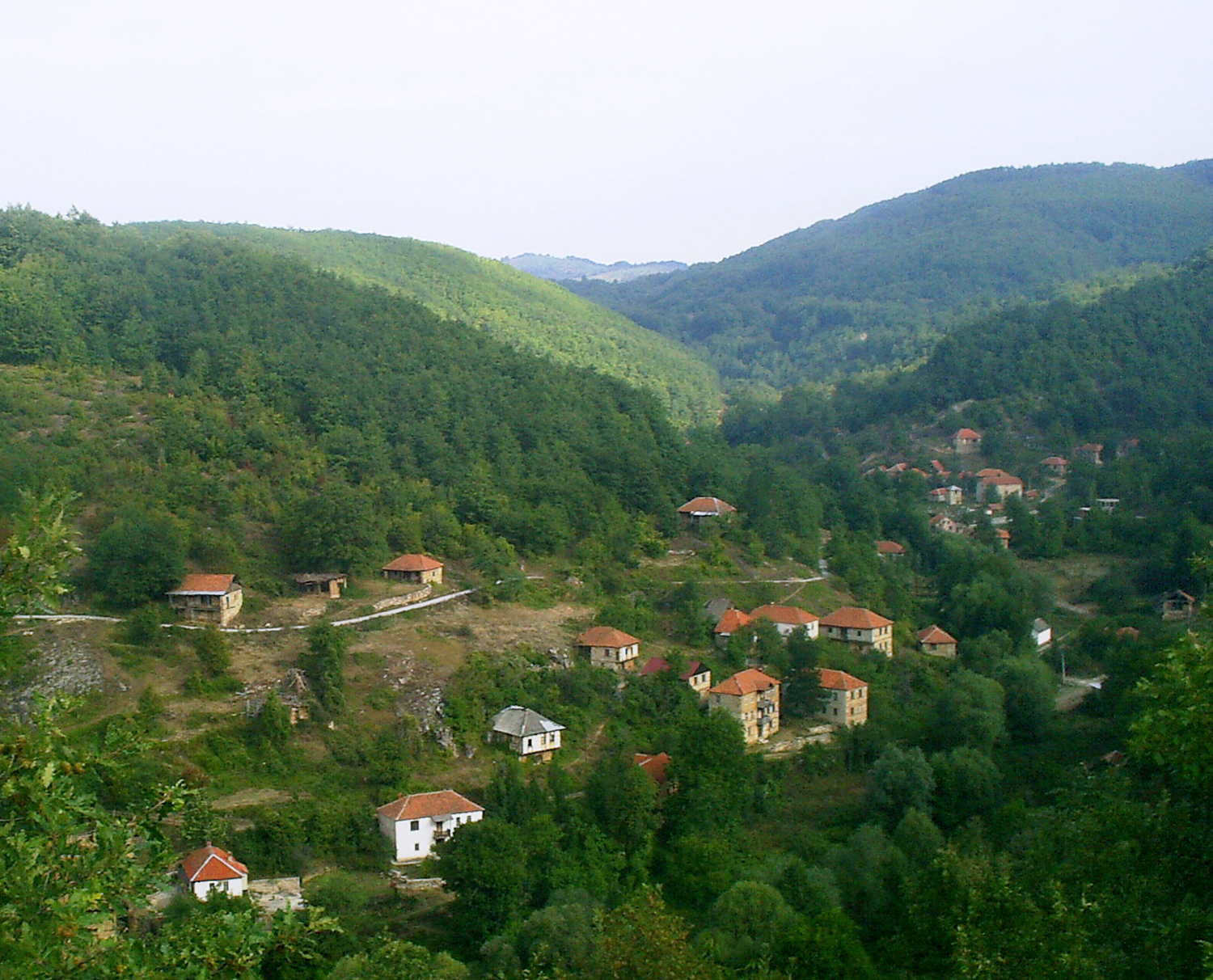 Мраморец :)